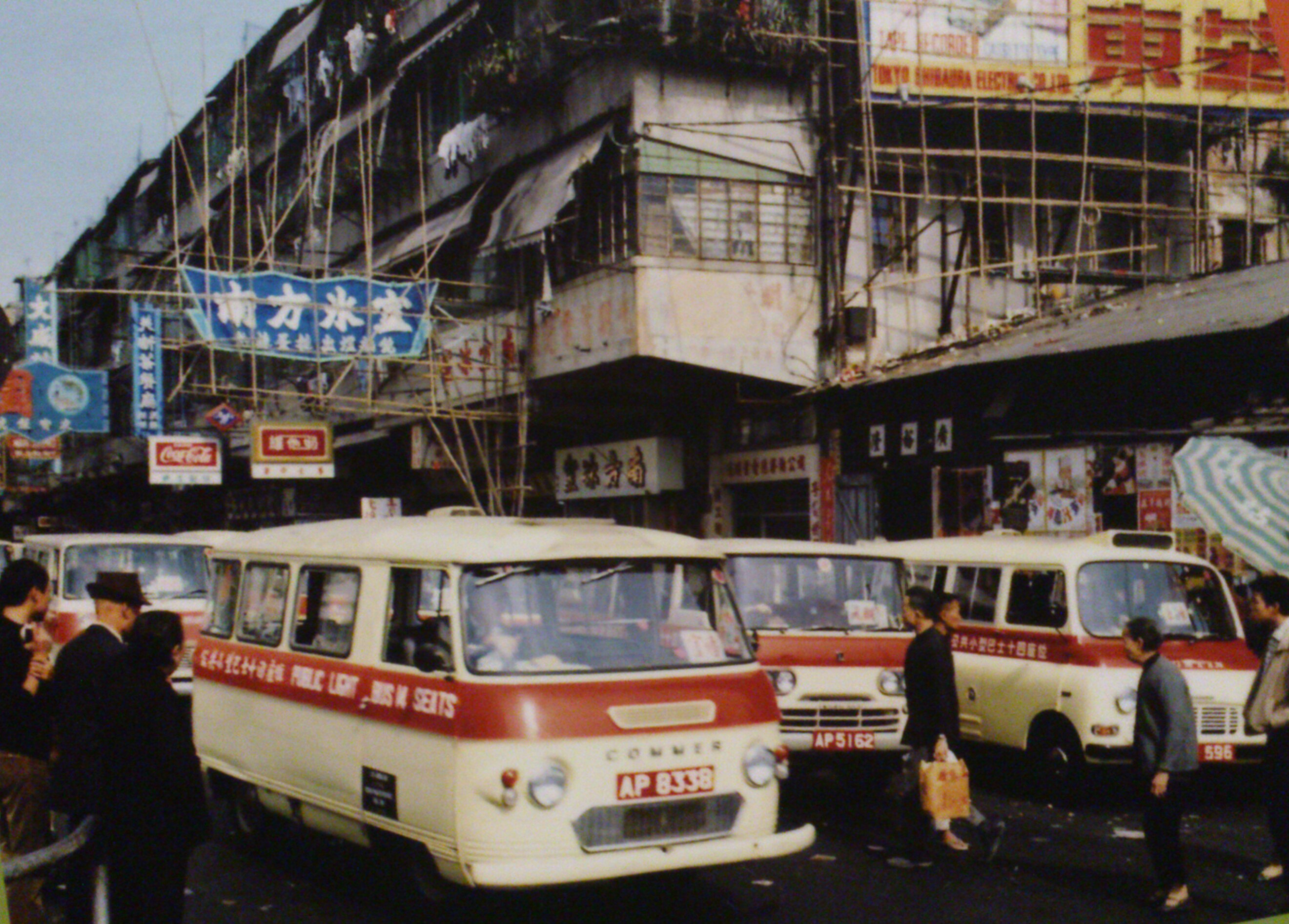 旺角